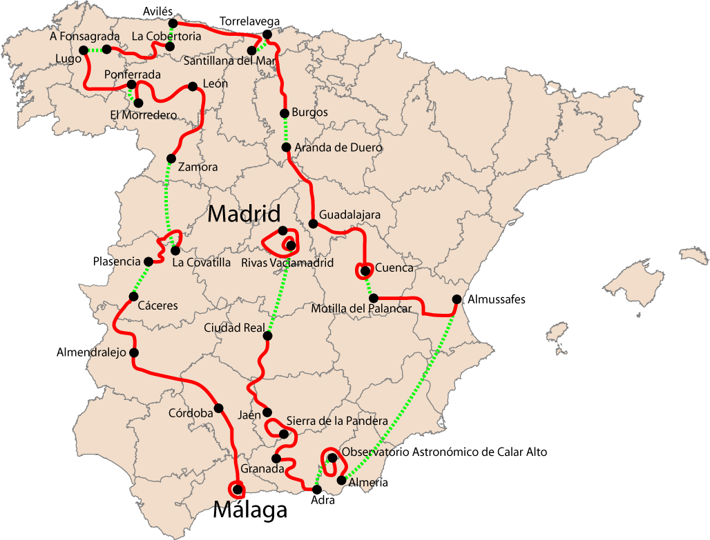 Vuelta a Espana 2006